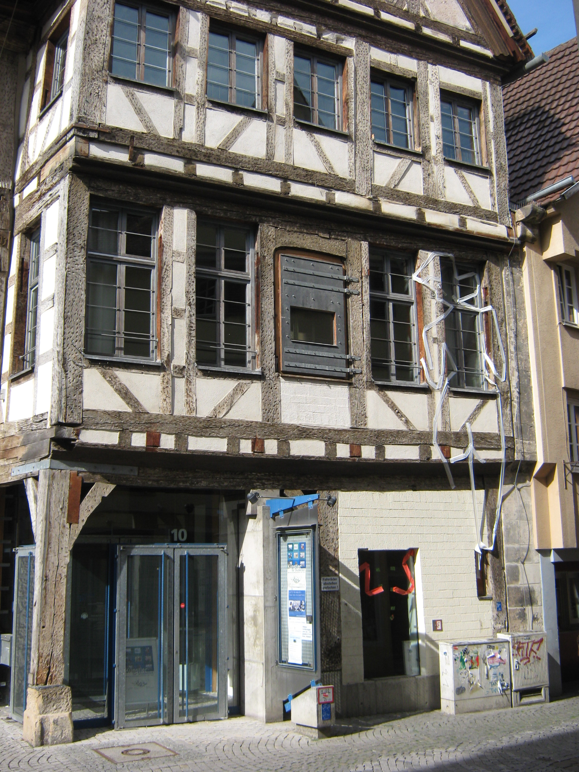 Das Stadtmuseum Tübingen befindet sich seit 1991 im Kornhaus in der Kornhausstr. 10 in Tübingen. Der ältere Teil des Gebäudes stammt von 1453. Zwischenzeitlich waren im Gebäude auch eine Knabenschule, eine Mädchenschule, eine Realschule, Feurerwehr und Rotes Kreuz untergebracht.